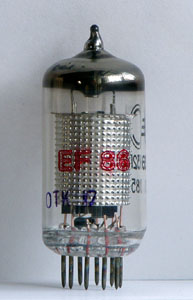 Eine moderne russische EF86 von Svetlana